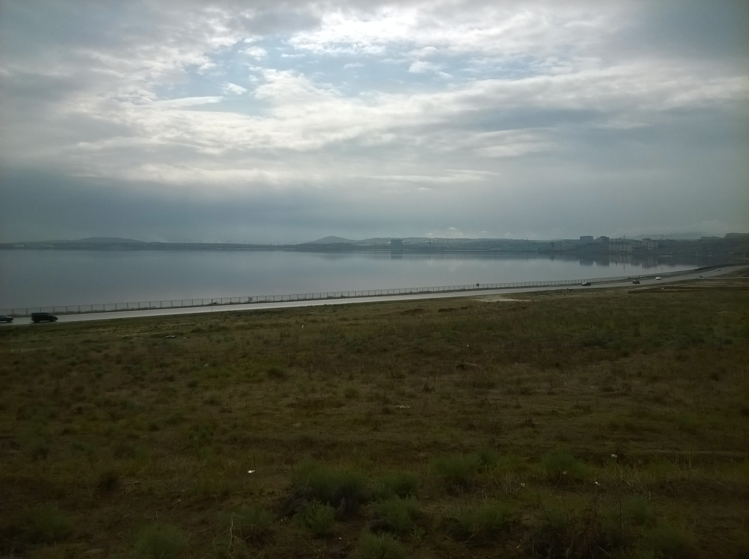 Masazır gölü